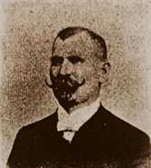 Josef Švejk (1869 - 1939), Rakouský a český politik.